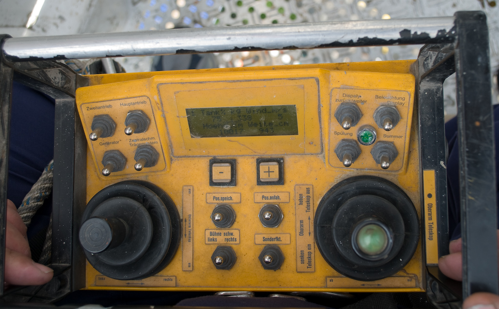 Ruthmann TTS1000 Bedienpult -- Auf dem Display zu sehen: Tankfuellung (75%), Zuladung (338kg), Windgeschwindigkeit (5m/s), Hoehe (10017cm), seitliche Auslage (943cm)